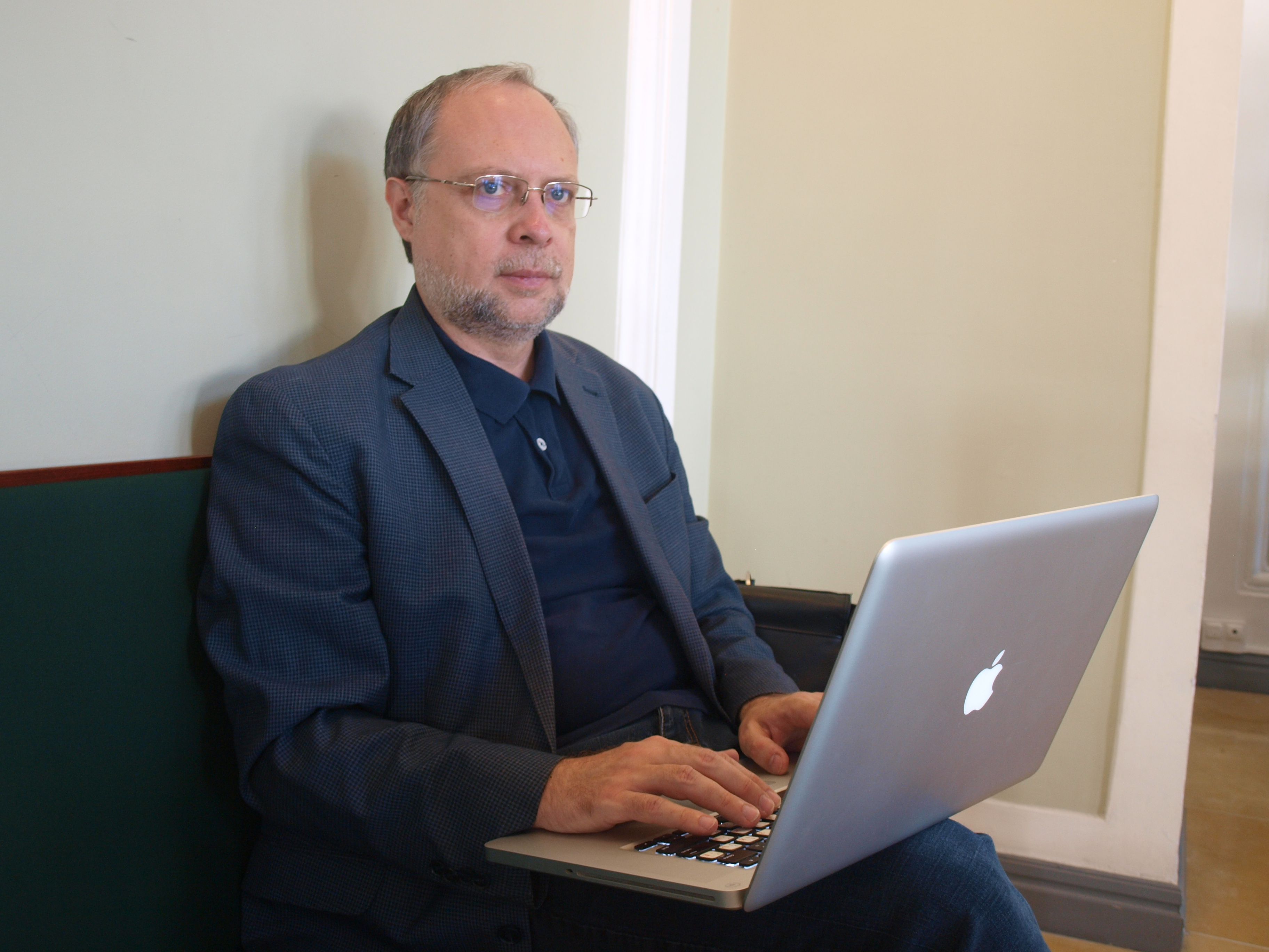 Главный редактор Credo.press Александр Солдатов делает репортаж. Москва, 14.09.2018